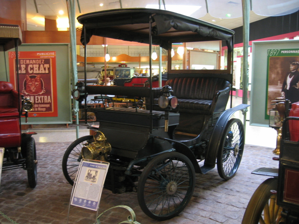 Peugeot Type 16 - Musée Peugeot Sochaux